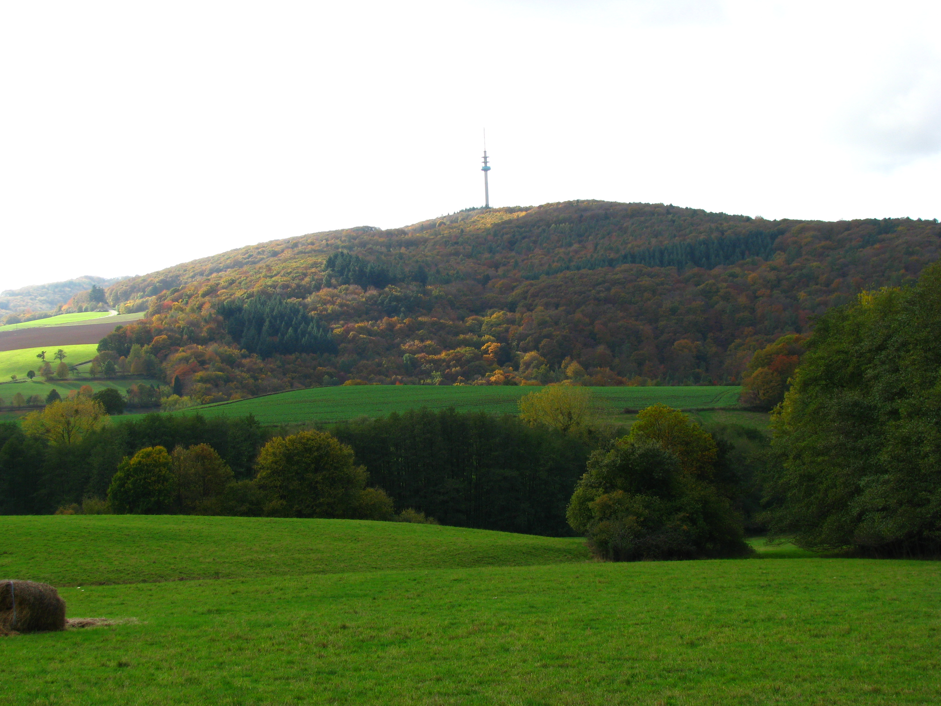 Der Bornberg bei Eßweiler im Nordpfälzer Bergland